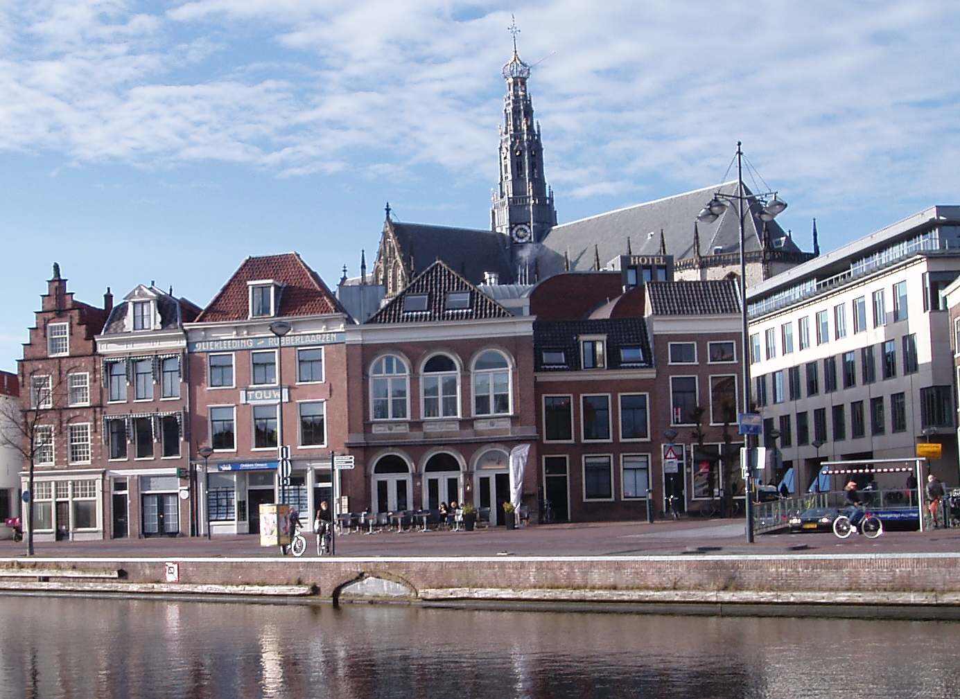 Rivier het Spaarne in Haarlem; te zien is de voormalige uitmonding van de Beek, een voormalige beek die liep van het Spaarne naar de Brouwerskolk in Overveen. De Damstraat, rechts, is vernoemd naar de oorspronkelijke dam over de Haarlemse beek. Rechts met hoge gevel is het Fundatiehuis (Teyler). Achter de Damstraat is de Grote of St. Bavokerk.